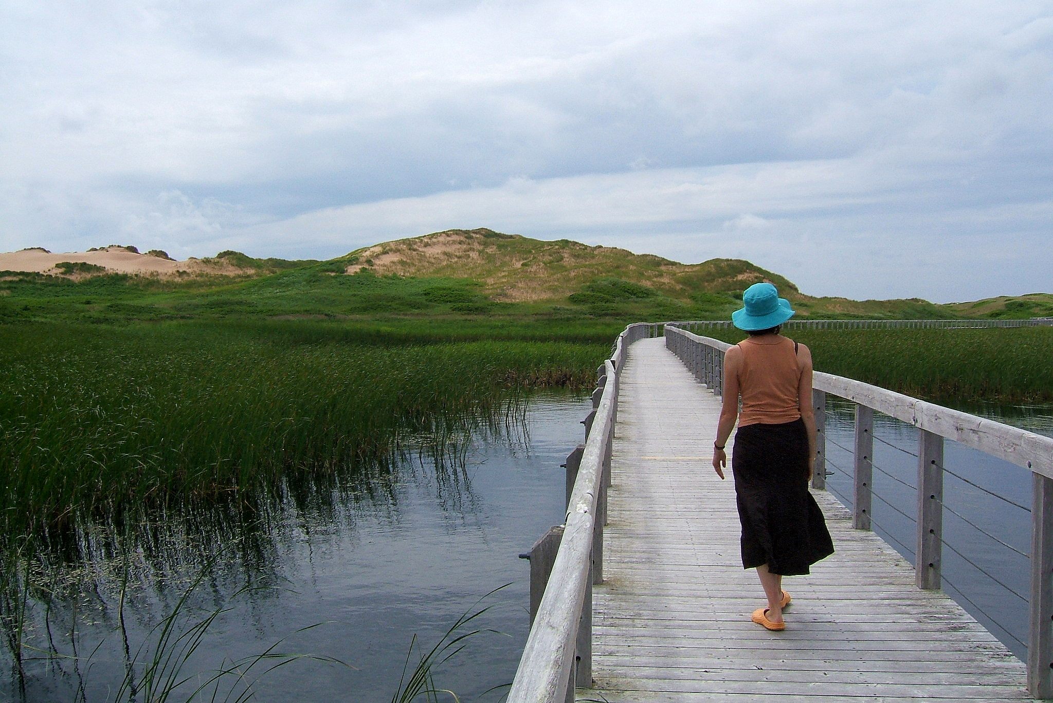 Sentier des dunes de Greenwich au parc national de l'île-du-Prince-Édoouard